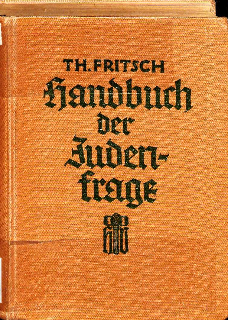 Theodor Fritsch Handbuch der Judenfrage : die wichtigsten Tatsachen zur Beurteilung des jüdischen Volkes Hammer-Verlag Leipzig 1939